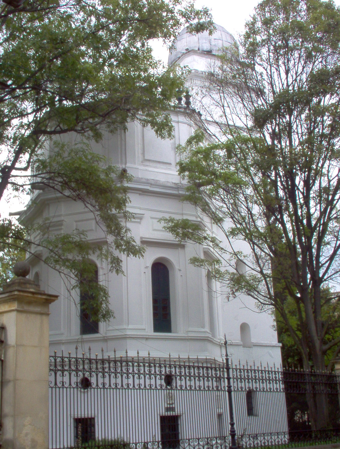 Foto del edificio del Observatorio nacional de Colombia